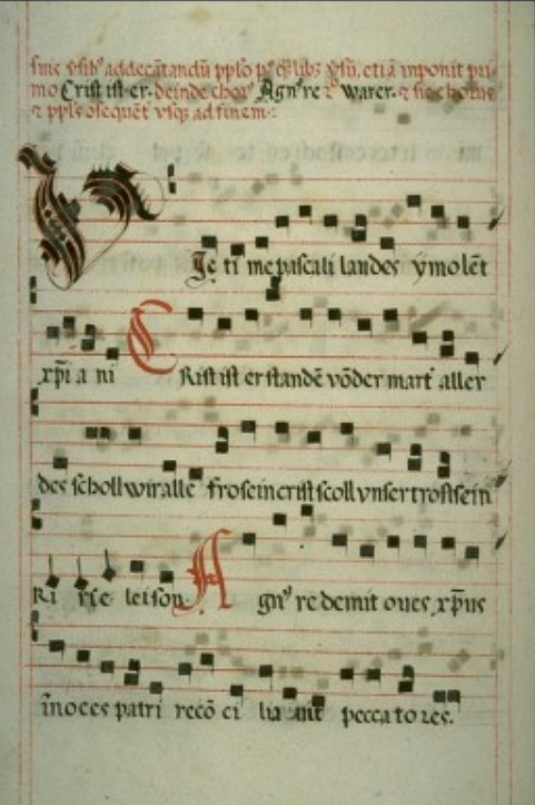 Stiftsbibliothek Admont, Codex 323, Blatt LXVIIr: Anfang der lateinischen Ostersequenz Victimae paschali laudes mit den eingeschobenen Zeilen des deutschen Christ ist erstanden